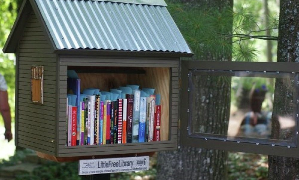 Громадська книжкова1 шафа